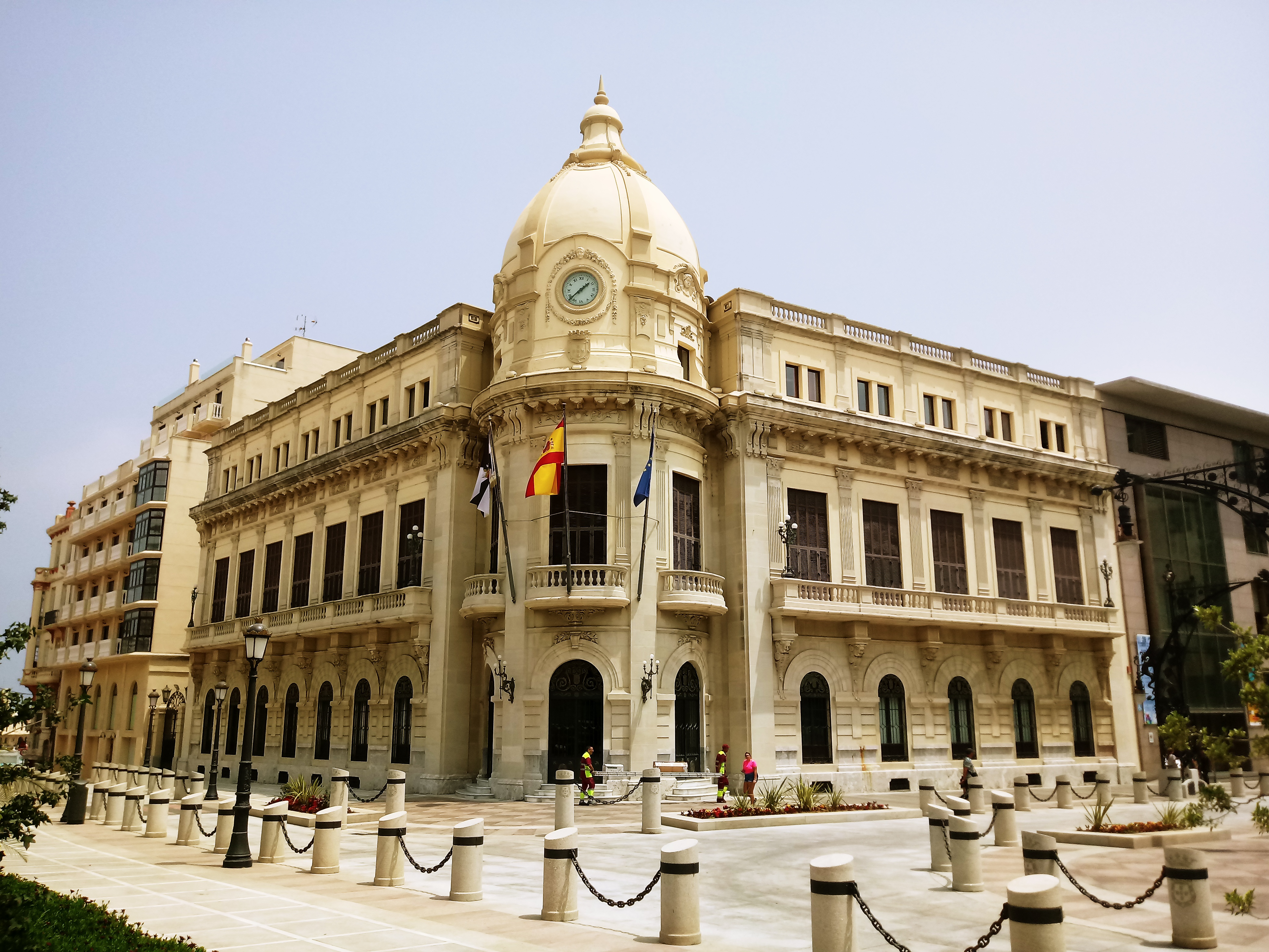 Fachada del ayuntamiento de Ceuta, parte antigua. Terminado en 1926 e inagurado en 1927